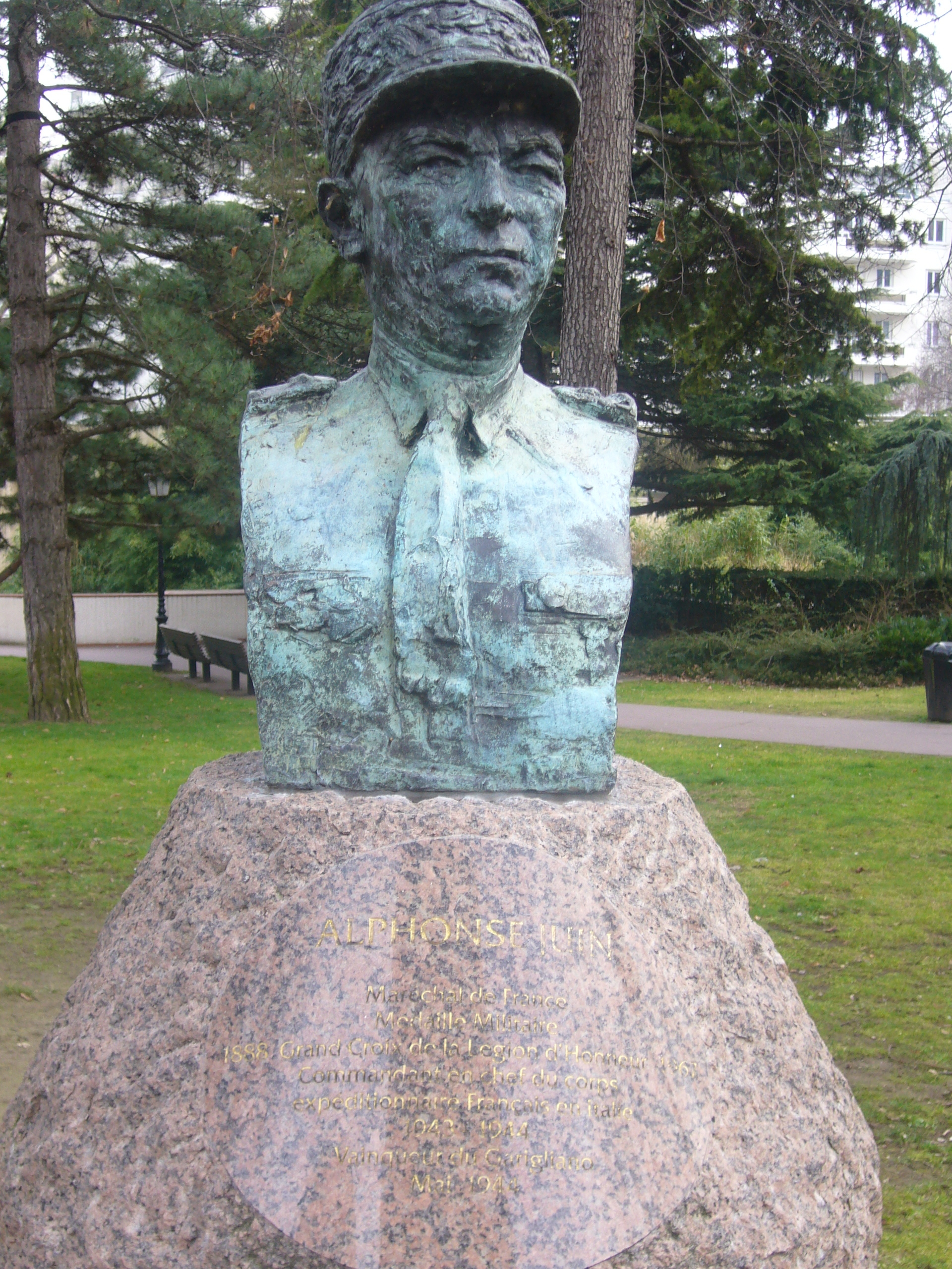 Statue d'Alphonse Juin, Square de l'Hotel de Ville, Courbevoie